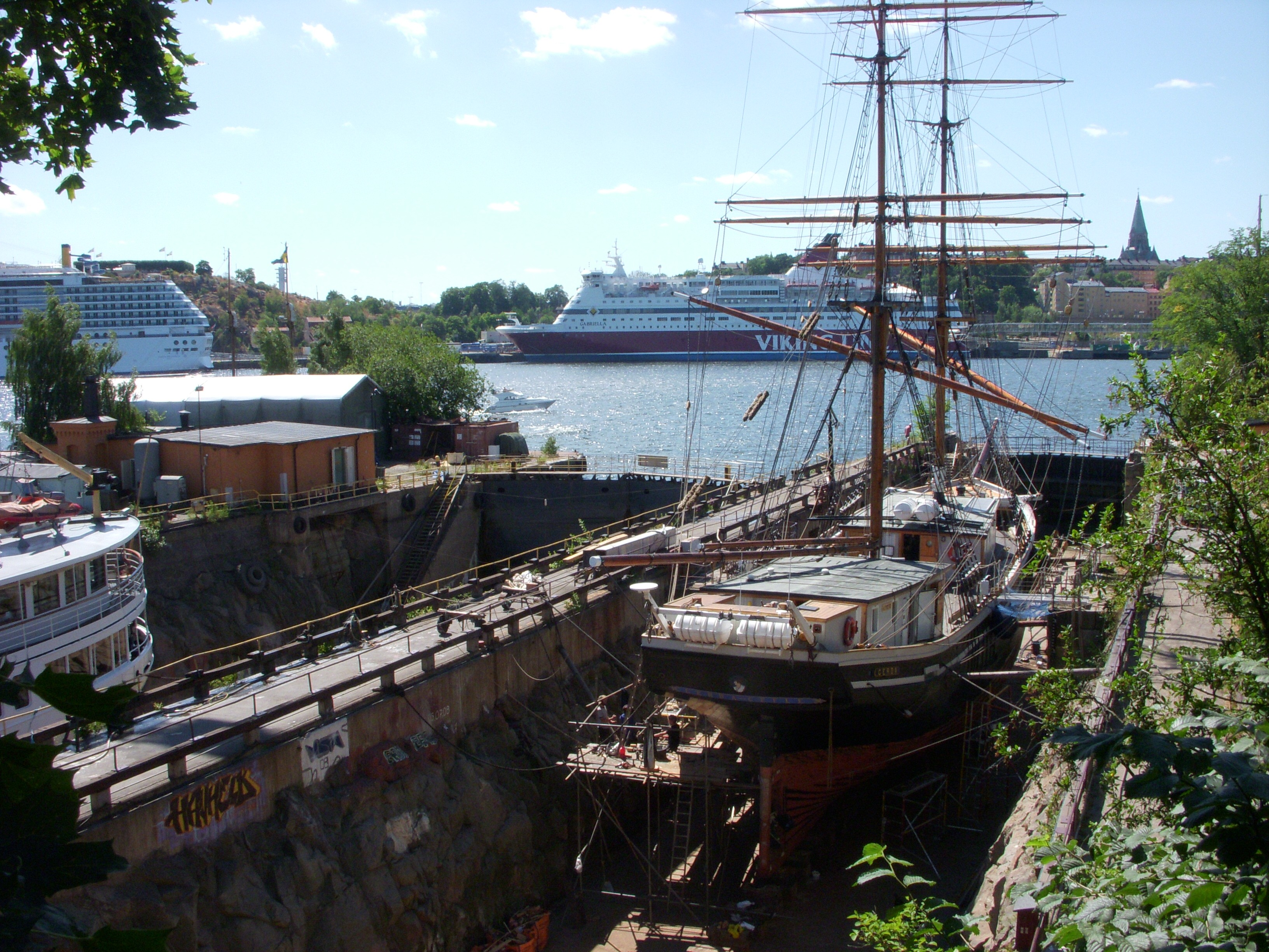 Beckholmen i Stockholm, västra torrdockan